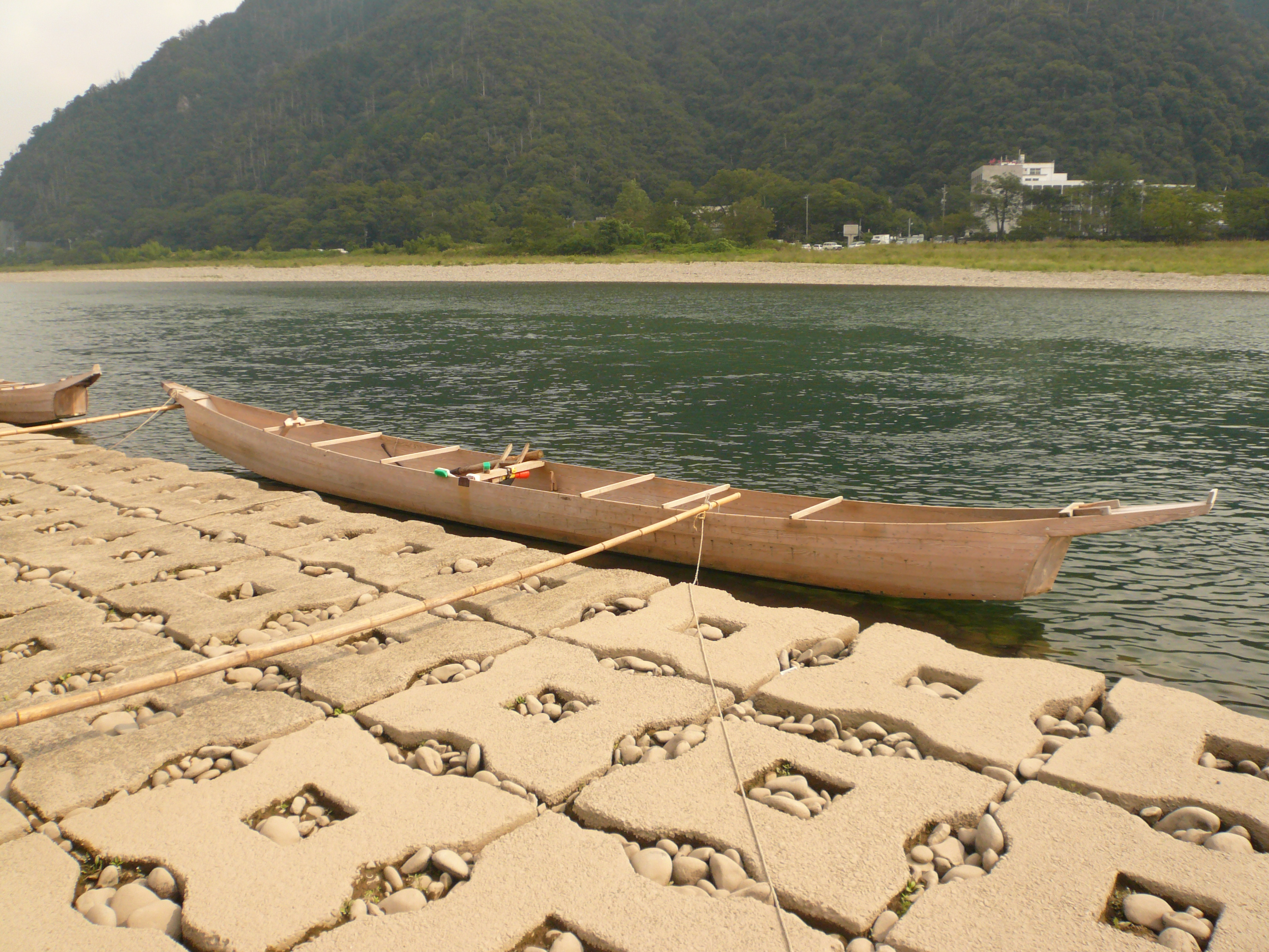 Ukai Nagaragawa（長良川鵜飼）,Gifu,Gifu(岐阜県岐阜市)で撮影。鵜舟。